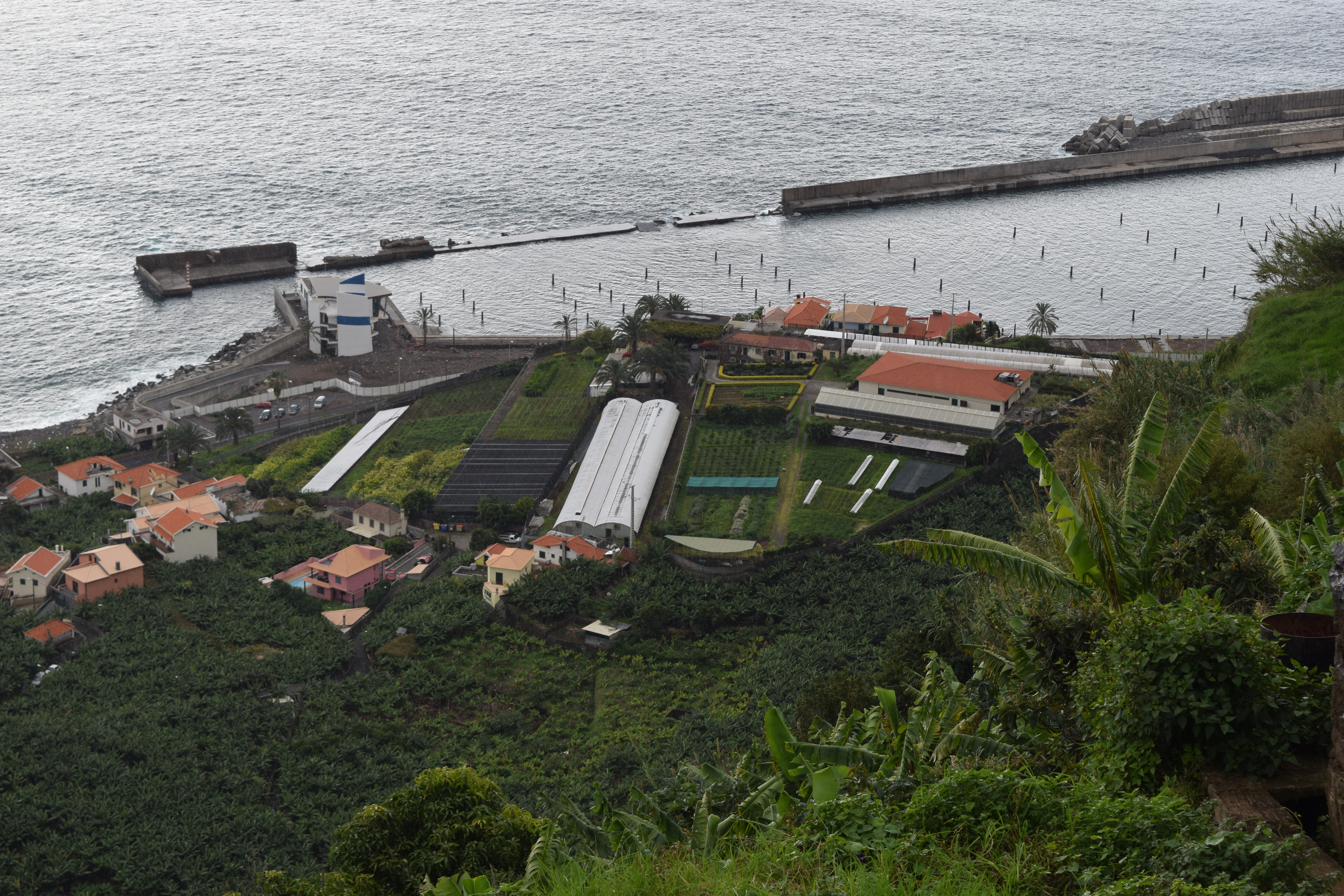 Pico do Calcete e ruinas da Marina do Lugar de Baixo